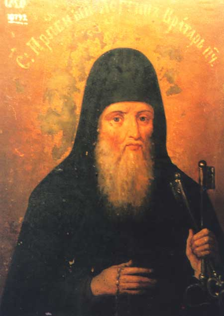 Saint Longinus the Gatekeeper of Kyiv Caves monastery, Ukraine (14th cen.), Orthodox saint. Лонгін, воротар Печерський - XIII-XIV ст. Чернець Печерського монастиря. Преподобний. Пам'ять 10 вересня і 29 жовтня. Епітафія на аркосольній іконі повідомляє, що прп.Лонгін, "свято і праведно проходячи монастирський послух, такого від Бога сподобився дару, що бачив таємні думки людей, які входять до монастиря й виходять з нього. Доброчесних підтримував у добрі, а злих нещадно викривав, спонукаючи до покаяння". Його мощі спочивають у Дальніх печерах. Збереглося зображення ченця в монументальних розписах лаврських храмів.